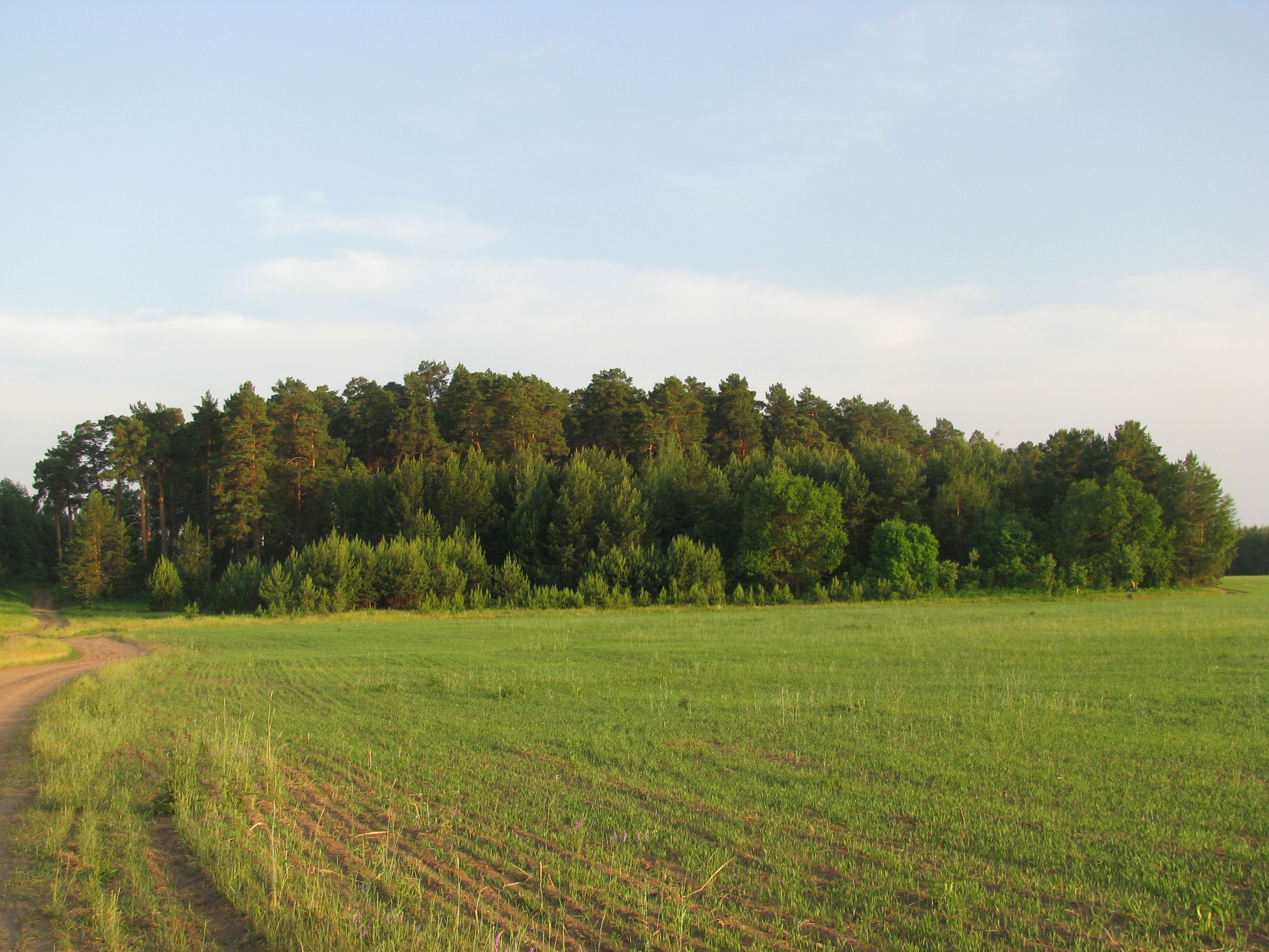 Сосновый бор возле деревни Новый Каинлык Краснокамского района БашкортостанаБашҡортса: Краснокама районы Яңы Ҡайынлыҡ ауылы янында ҡарағай урманы. Тәбиғәт ҡомартҡыһы. Ансар Нуретдинов архивынан.